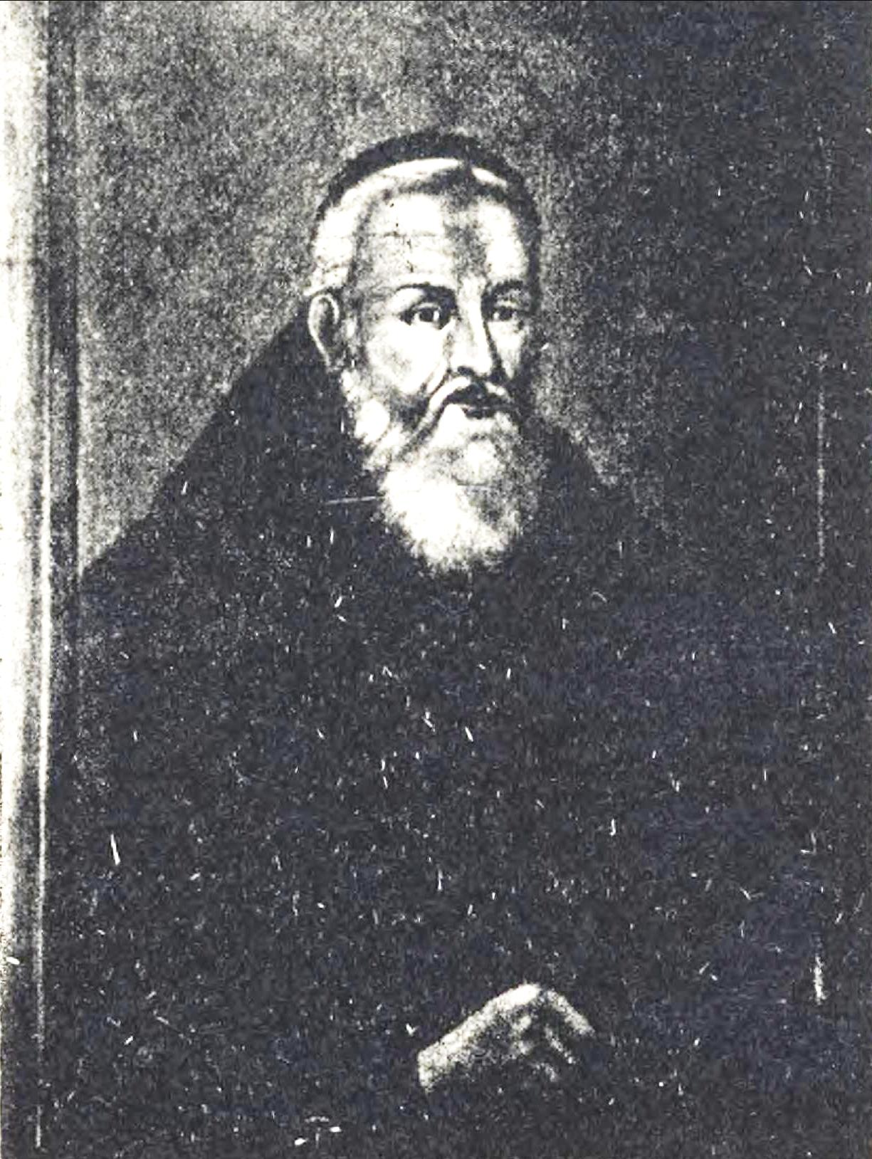 Партеній Ломиковський (+1729) - український церковний діяч, архидиякон Львівської архикатедри, ігумен Підгорецького монастиря (1686—1729)